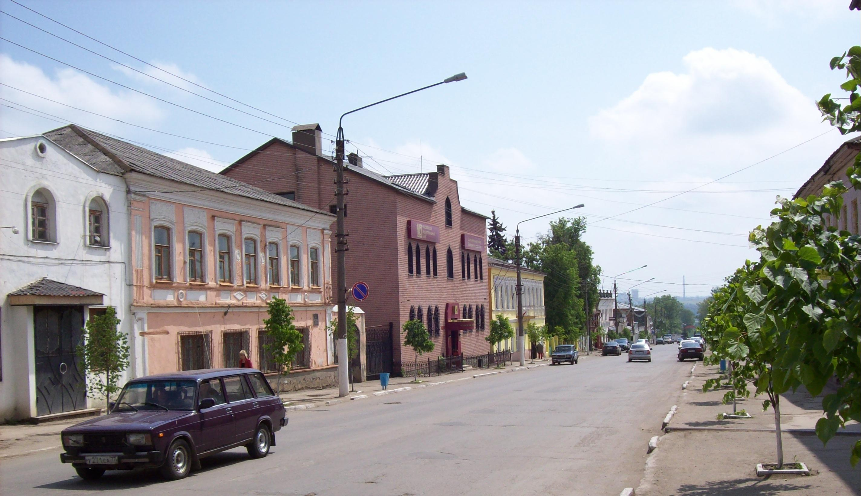 Ефремов, улица в центре города